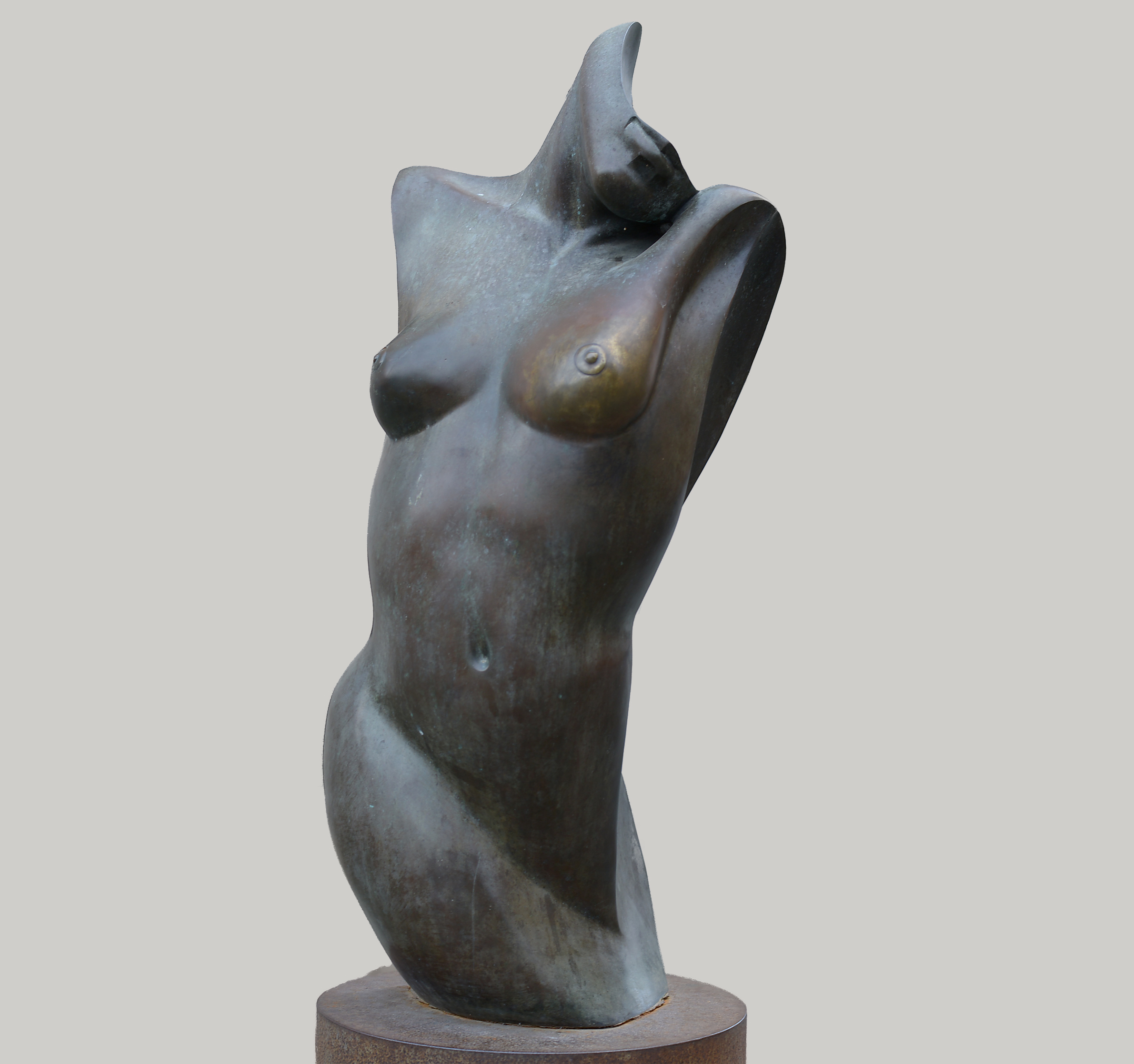 Torso. Escultura en bronce de Mustafá Arruf. 1993.